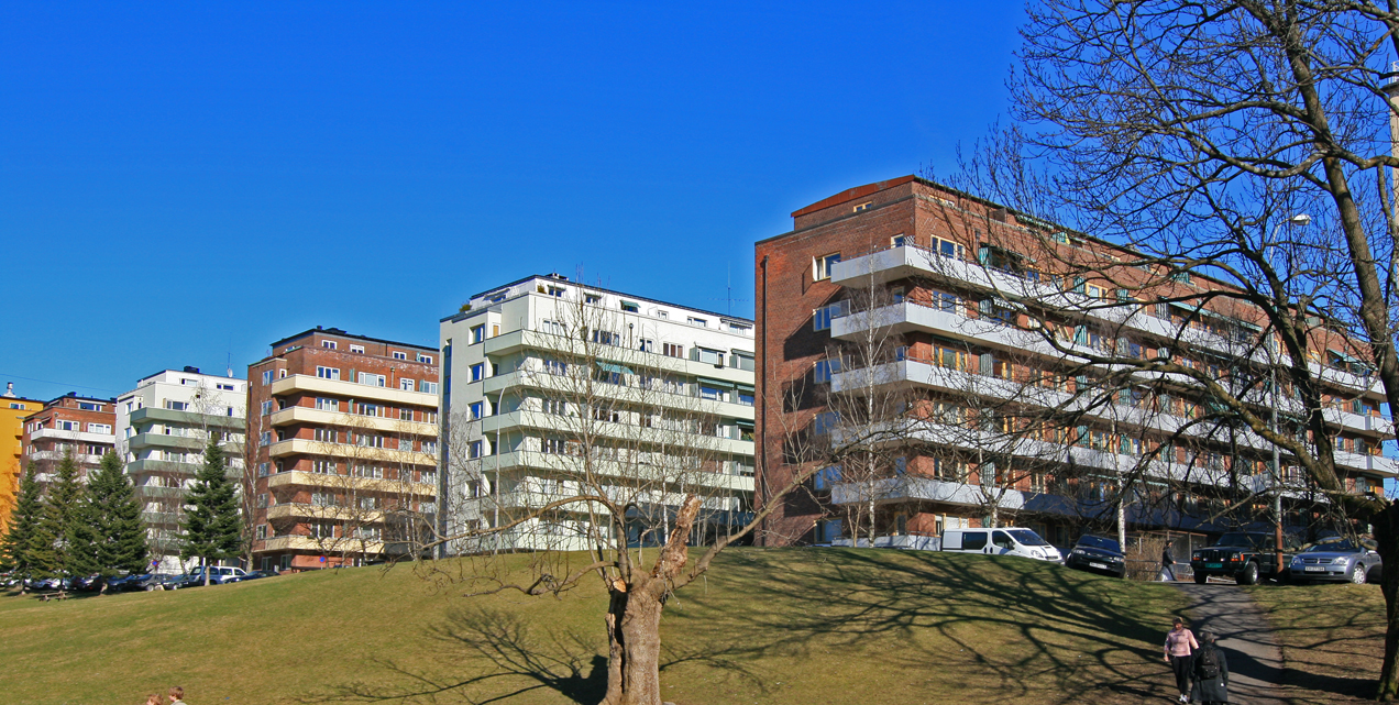 Marienlyst-blokkene, Kirkeveien 104-110, Oslo. Oppført 1936; arkitekt Sverre Poulson.